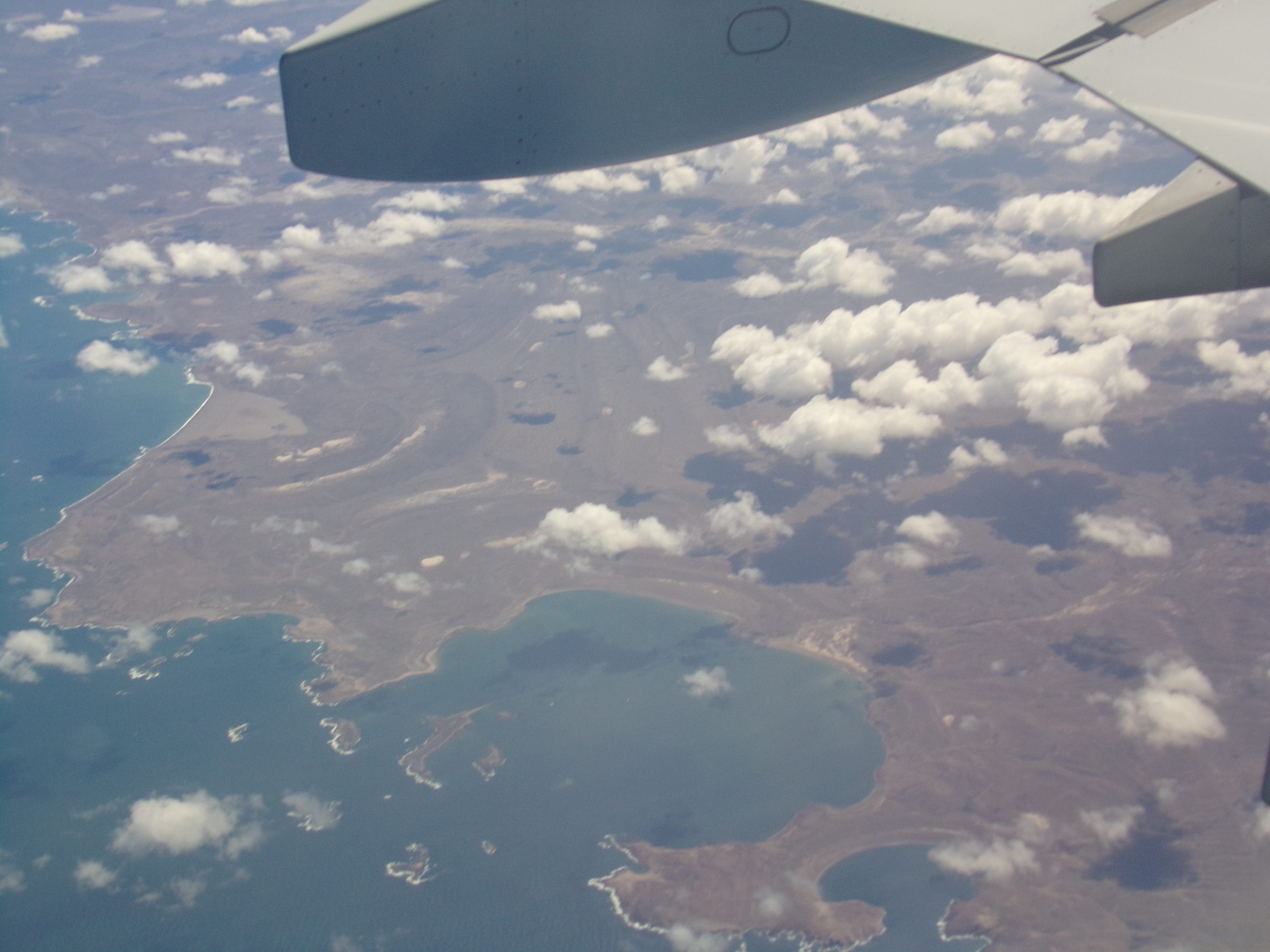 Bahía Melo, Chubut